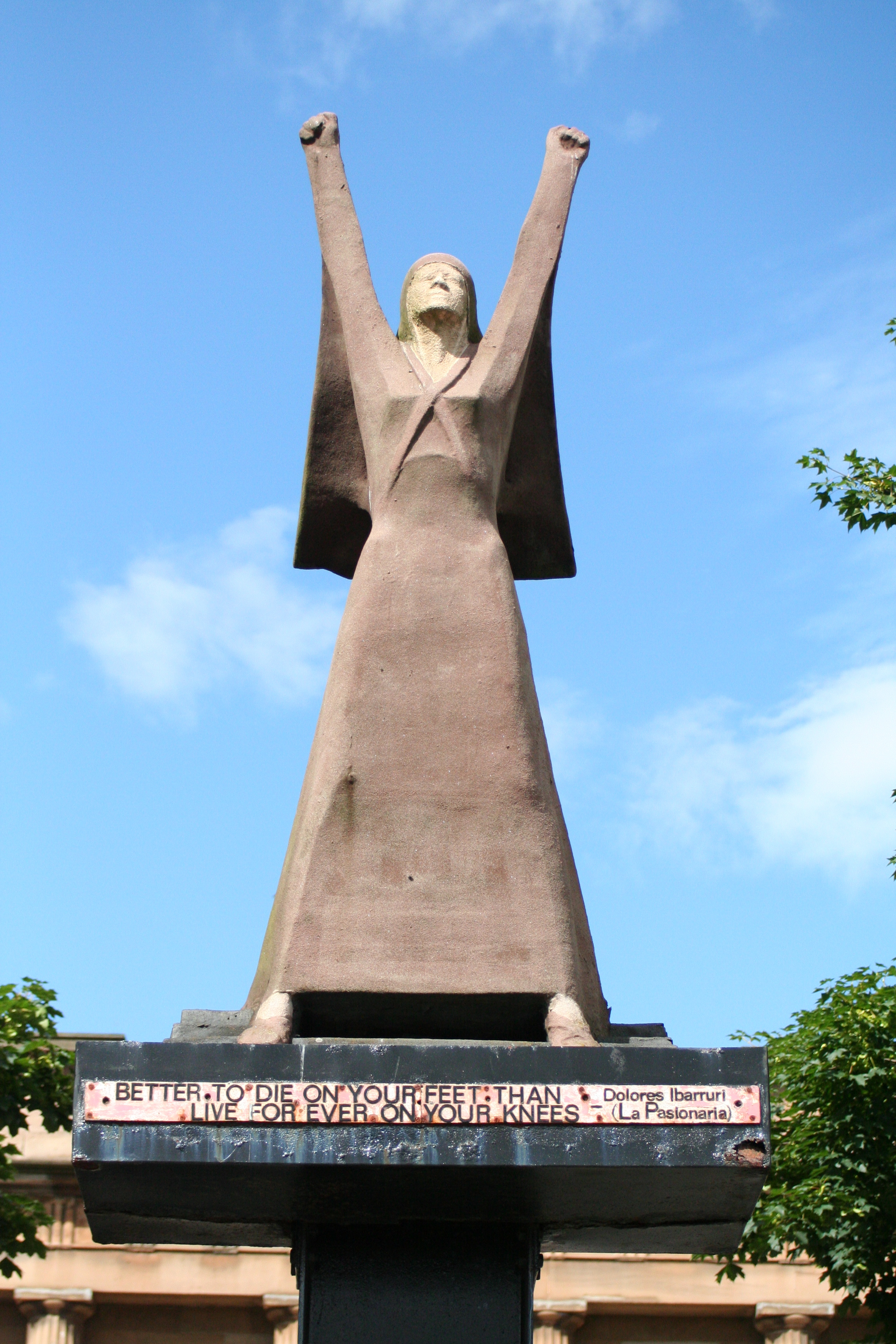 La Pasionaria Statue in Glasgow. "Lieber stehend sterben, als auf Knien leben.".